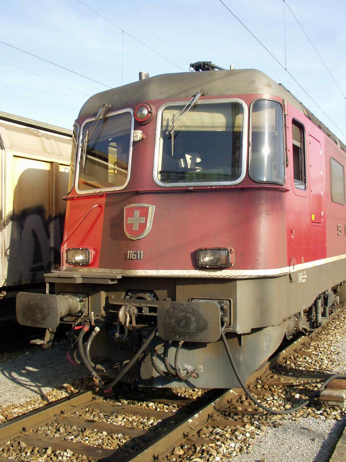 Elektrolokomotive der Schweizerischen Bundesbahnen des Typs Re 6/6 Nummer 11611 mit Klimaanlage (Front)